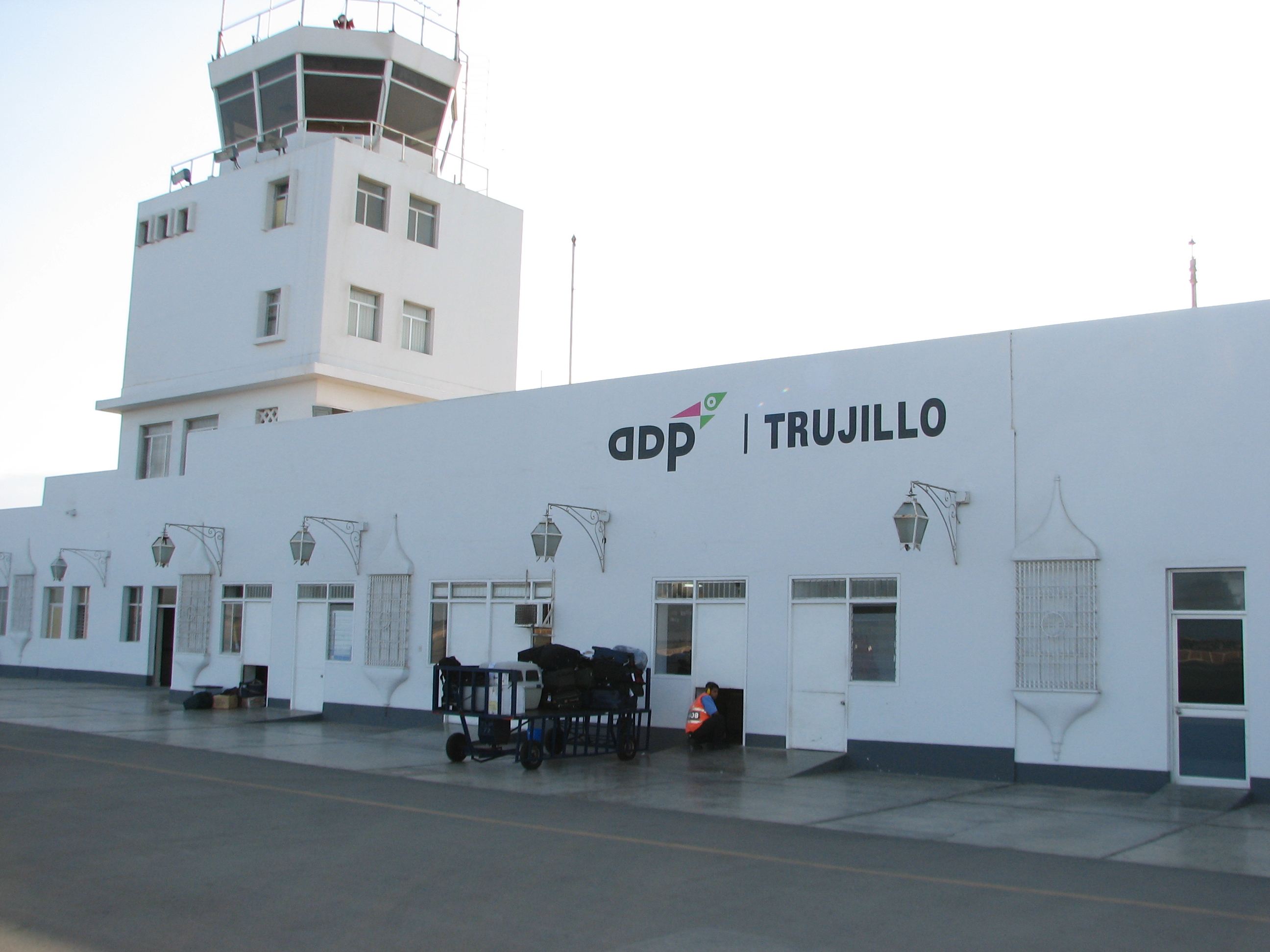 Airport Trujillo Peru